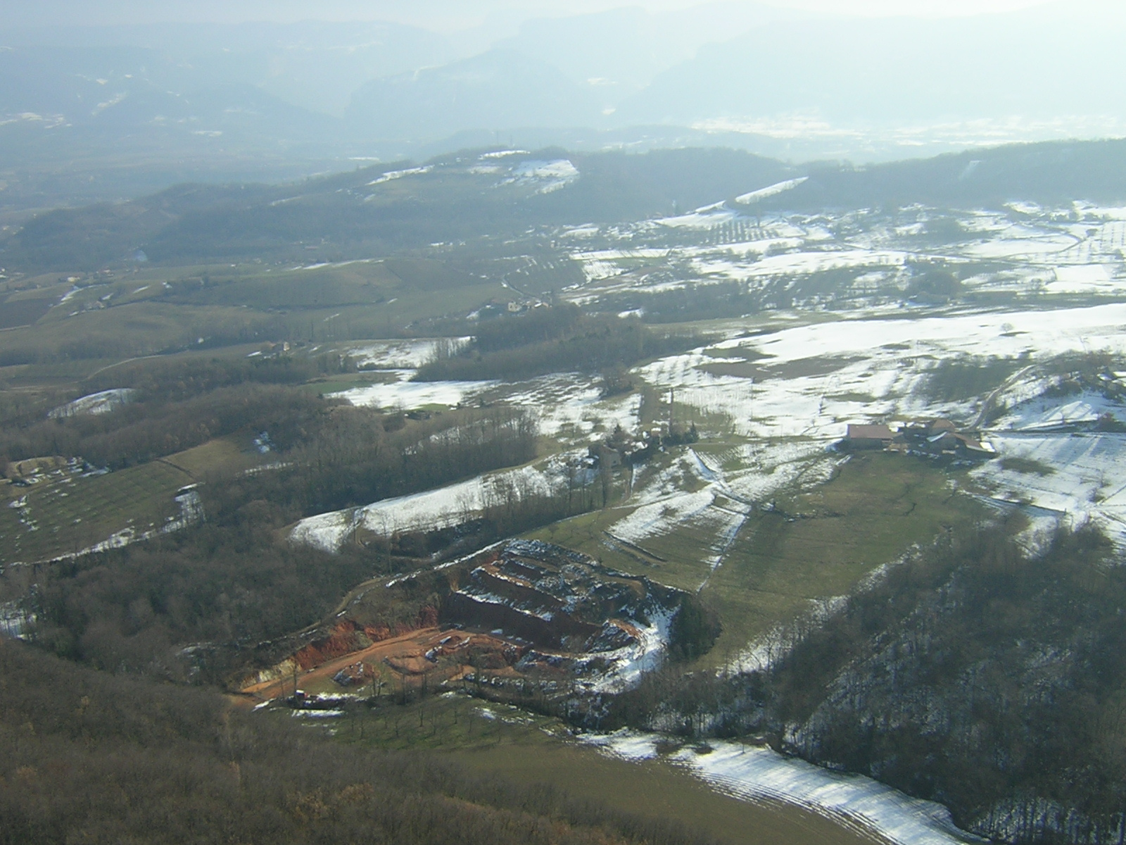 vue aérienne de Rochechinard commune de la Drôme en France, menacée par l'ouverture d'une carrière